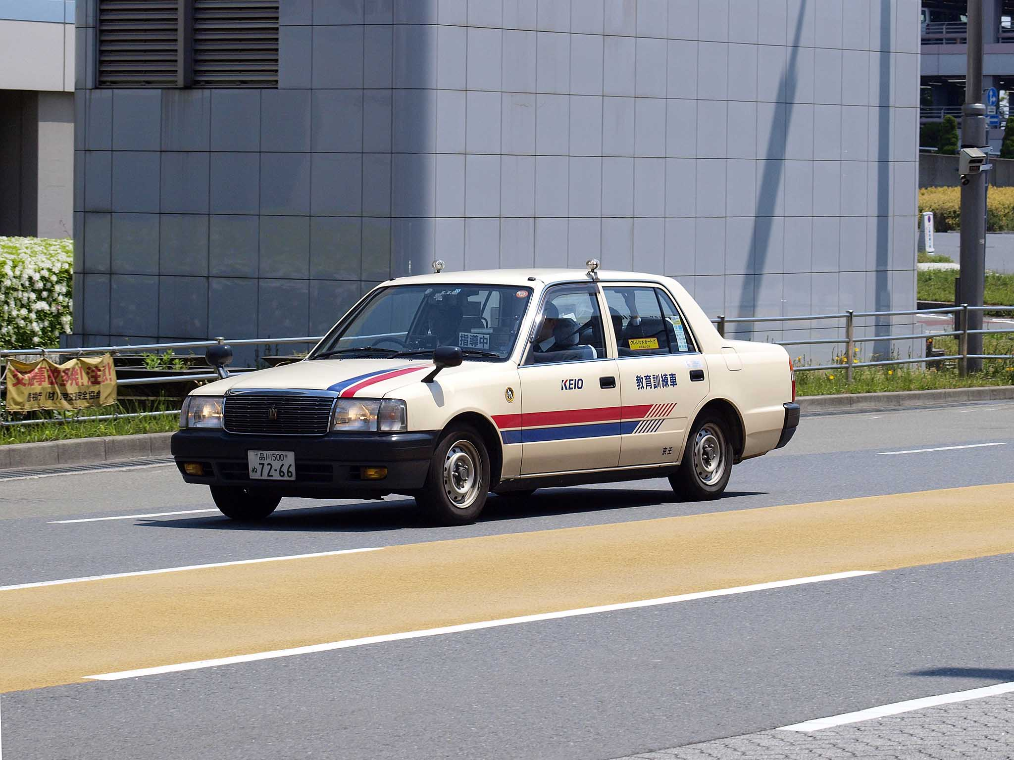 京王自動車のタクシー教育訓練車。経年車を自家用ナンバーで再登録してドライバーの教育研修や業務用車両として転用することがある。通常は実車／空車を表示するスーパーサイン部分の「指導中」に注目。 登録番号：品川500ぬ7266 撮影地：東京都大田区羽田空港